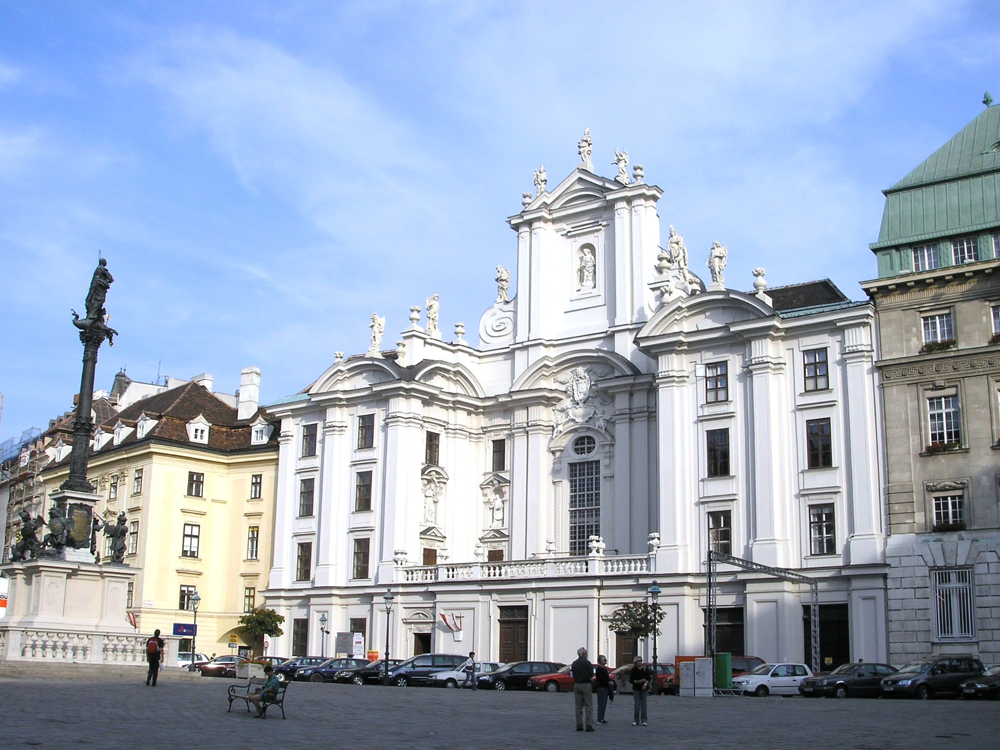 Kirche am Hof in Vienna.